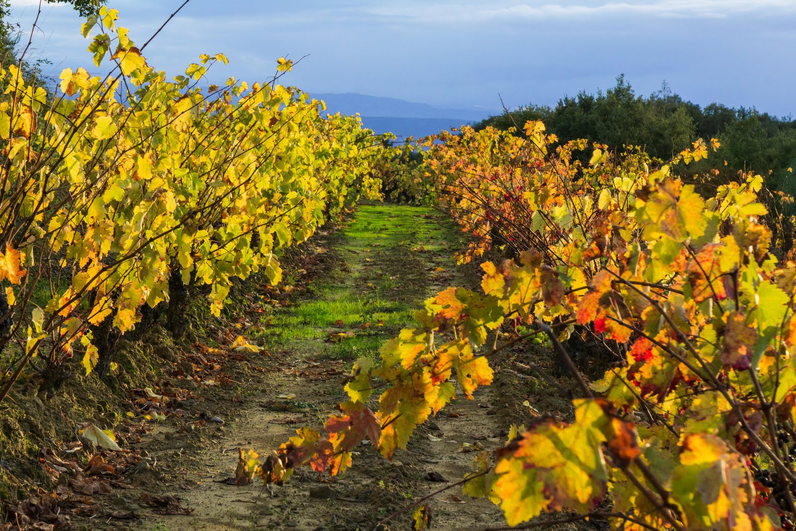 Lanciego/Lantziego, Álava, Spain